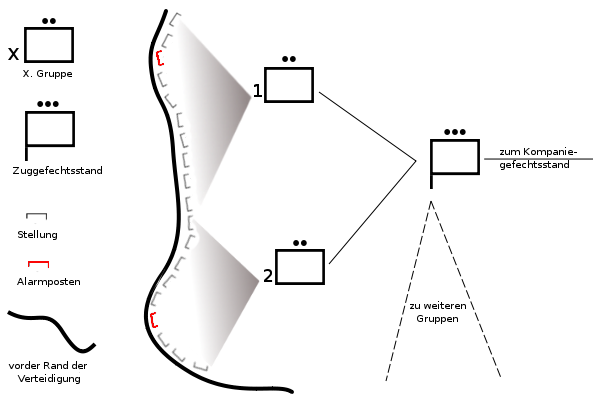 Grafik zur Veranschaulichung eines Stellungssystems